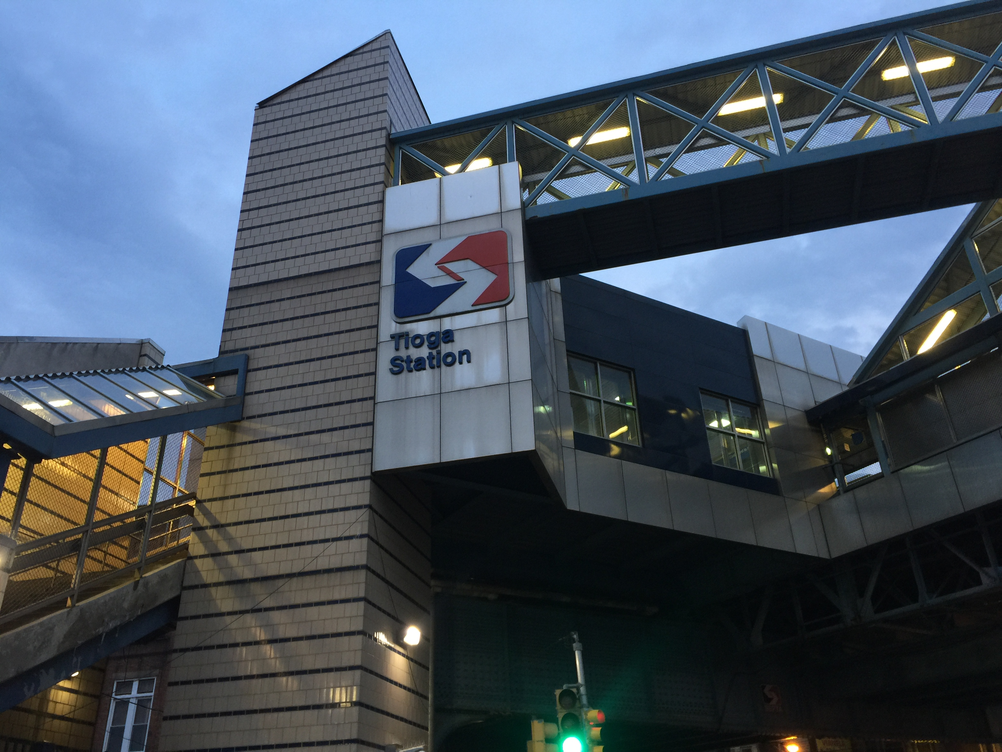 Tioga station